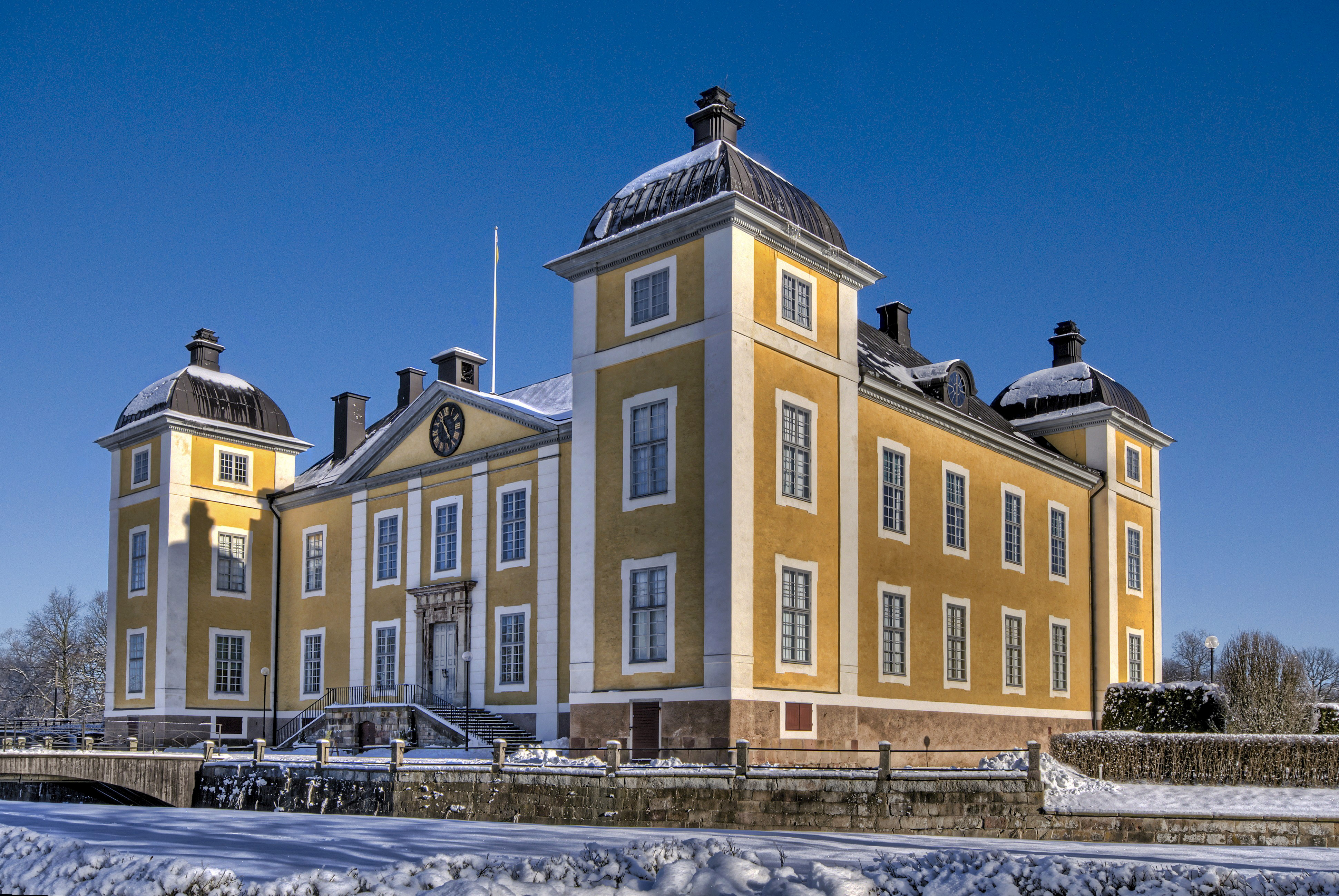 Strömsholms slott.